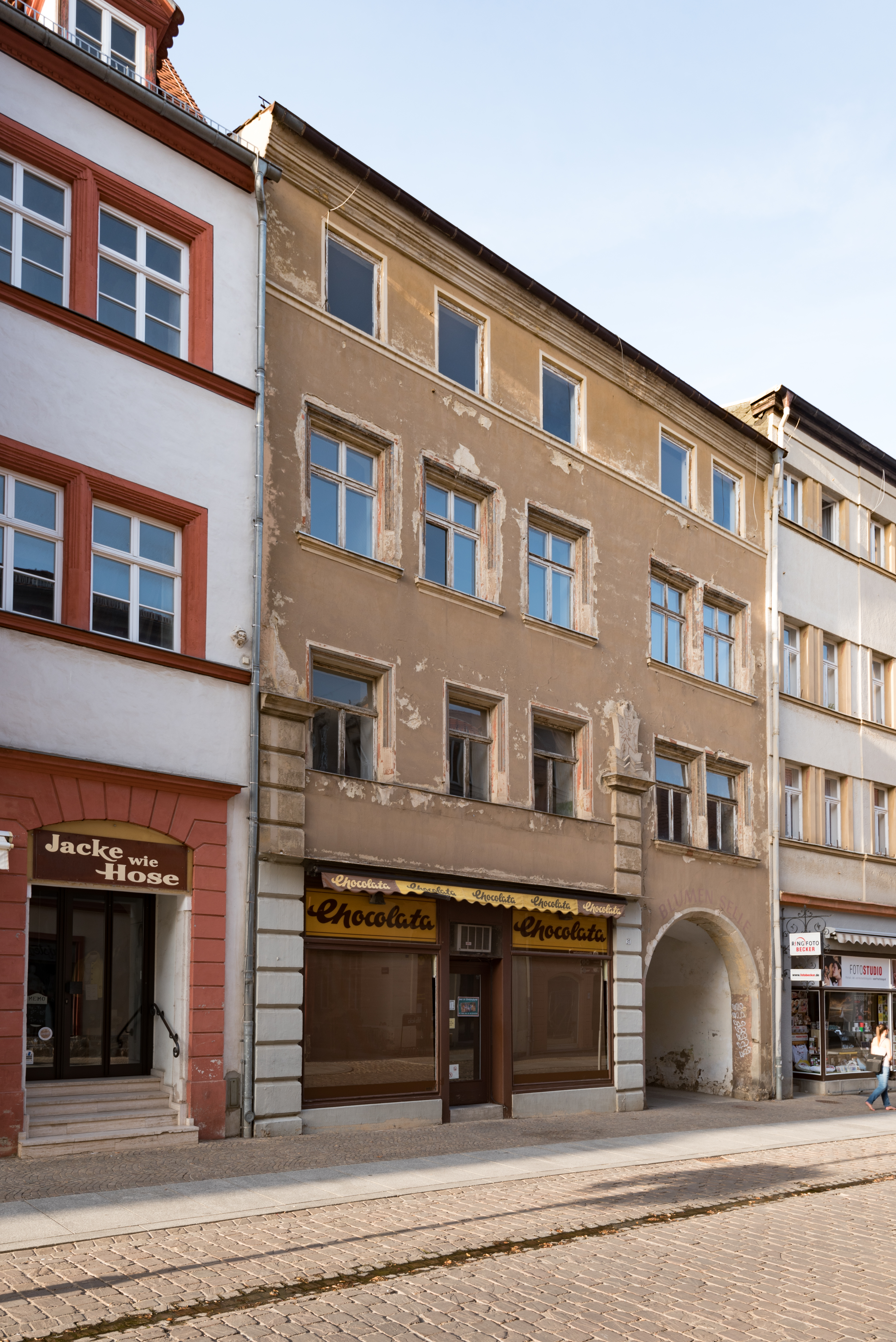 Naumburg (Saale), Jakobstraße 31